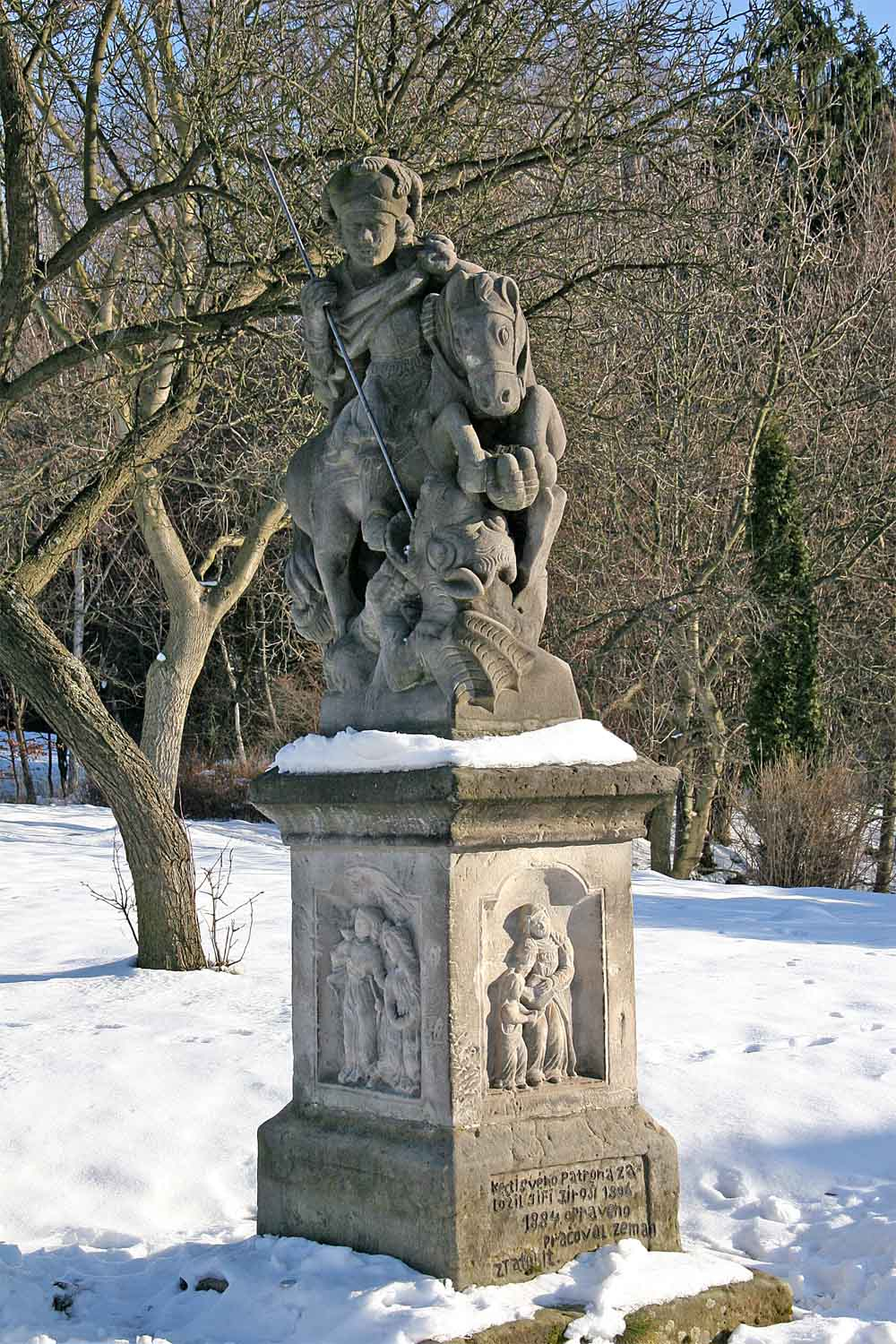 Lidová socha Svatého Jiří u Kopicova statku autor:Zp